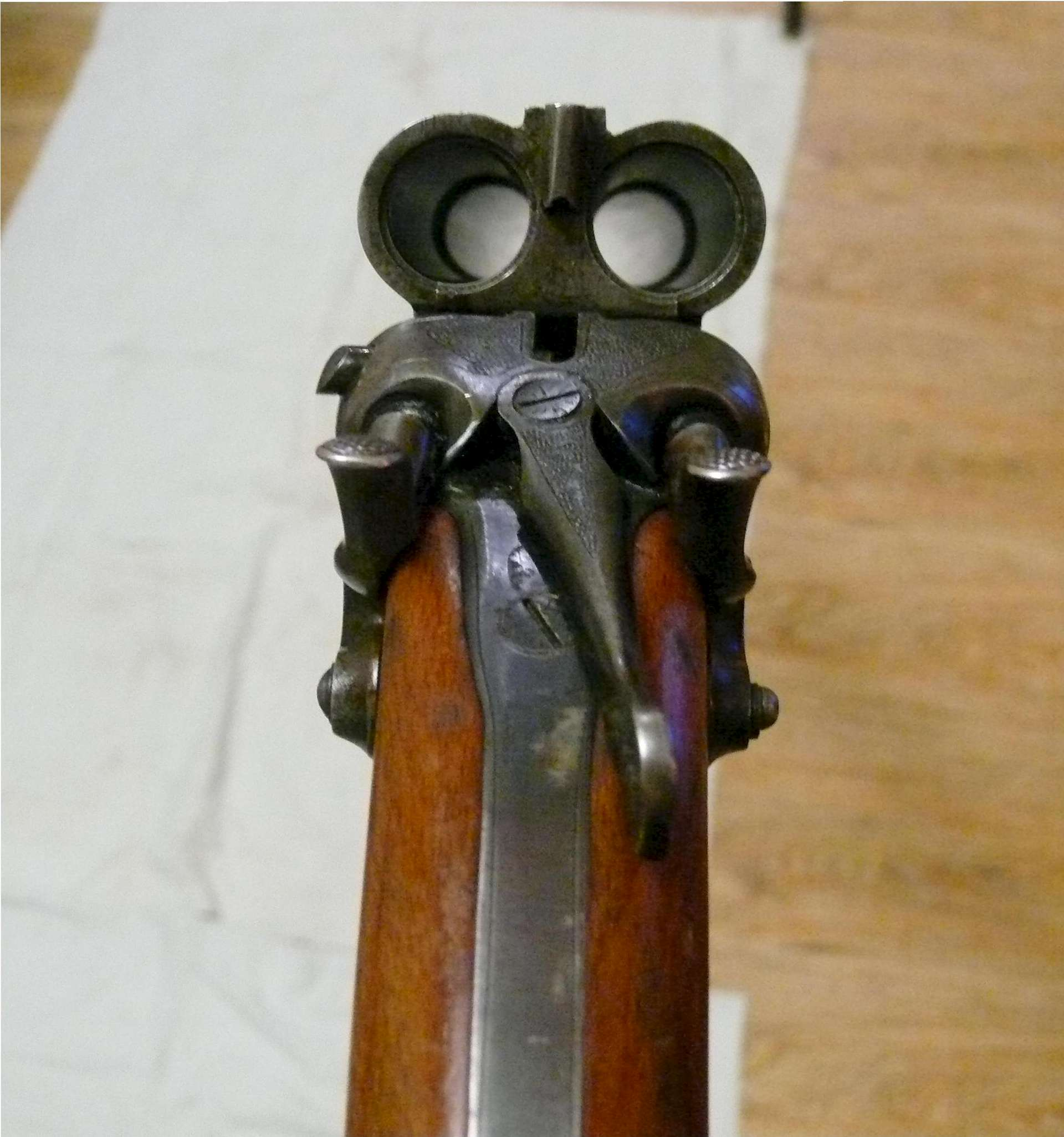 Вид на ствол и курки «ТОЗ-БМ» 16 калибра